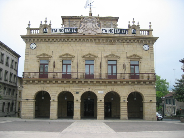 Ayuntamiento de Irun. Irungo Udala. Mairie d'Irun. Irun Town Council. Angel Yoldi. 13-05-2006